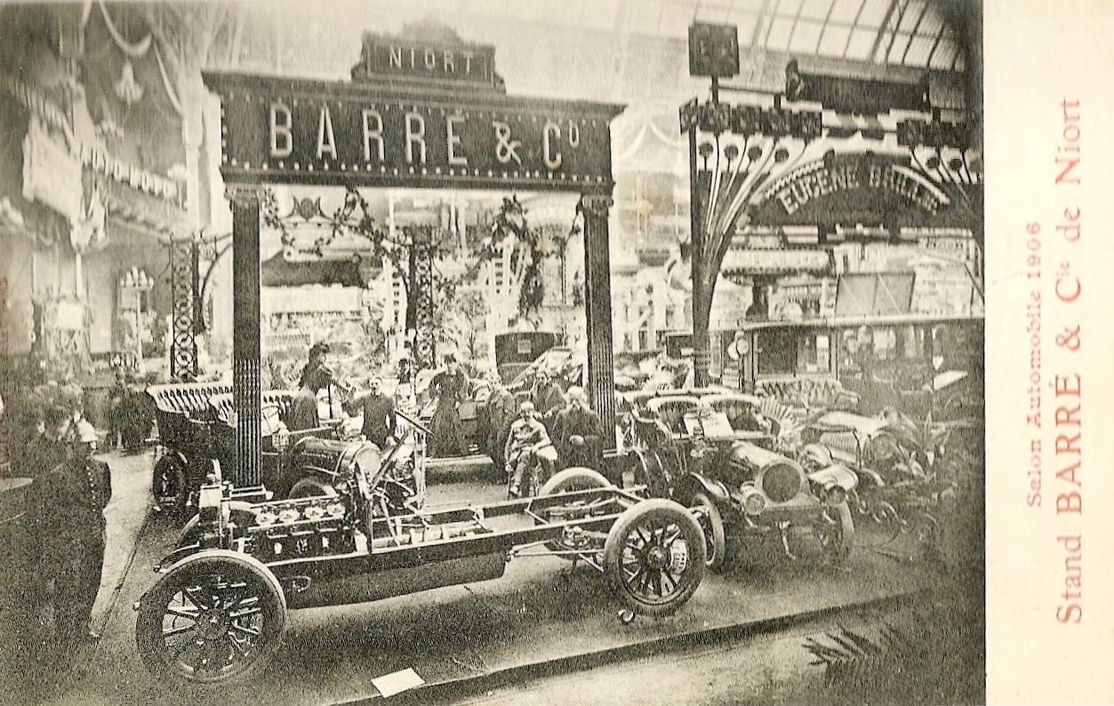 Carte postale du Salon automobile de Paris 1906, le stand des automobiles Barré et Cie de Niort.